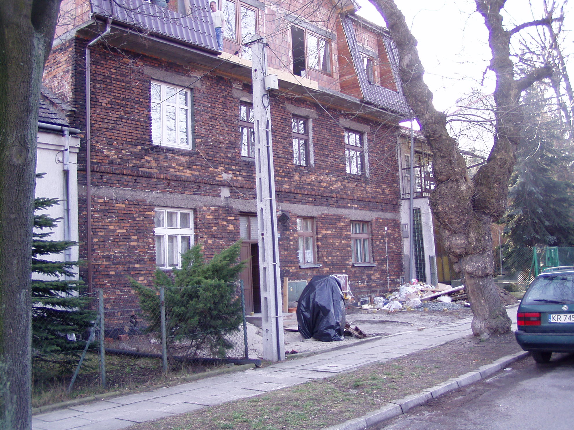 Bývalá telefonní centrála v koncentračním táboře Kraków-Plaszow.